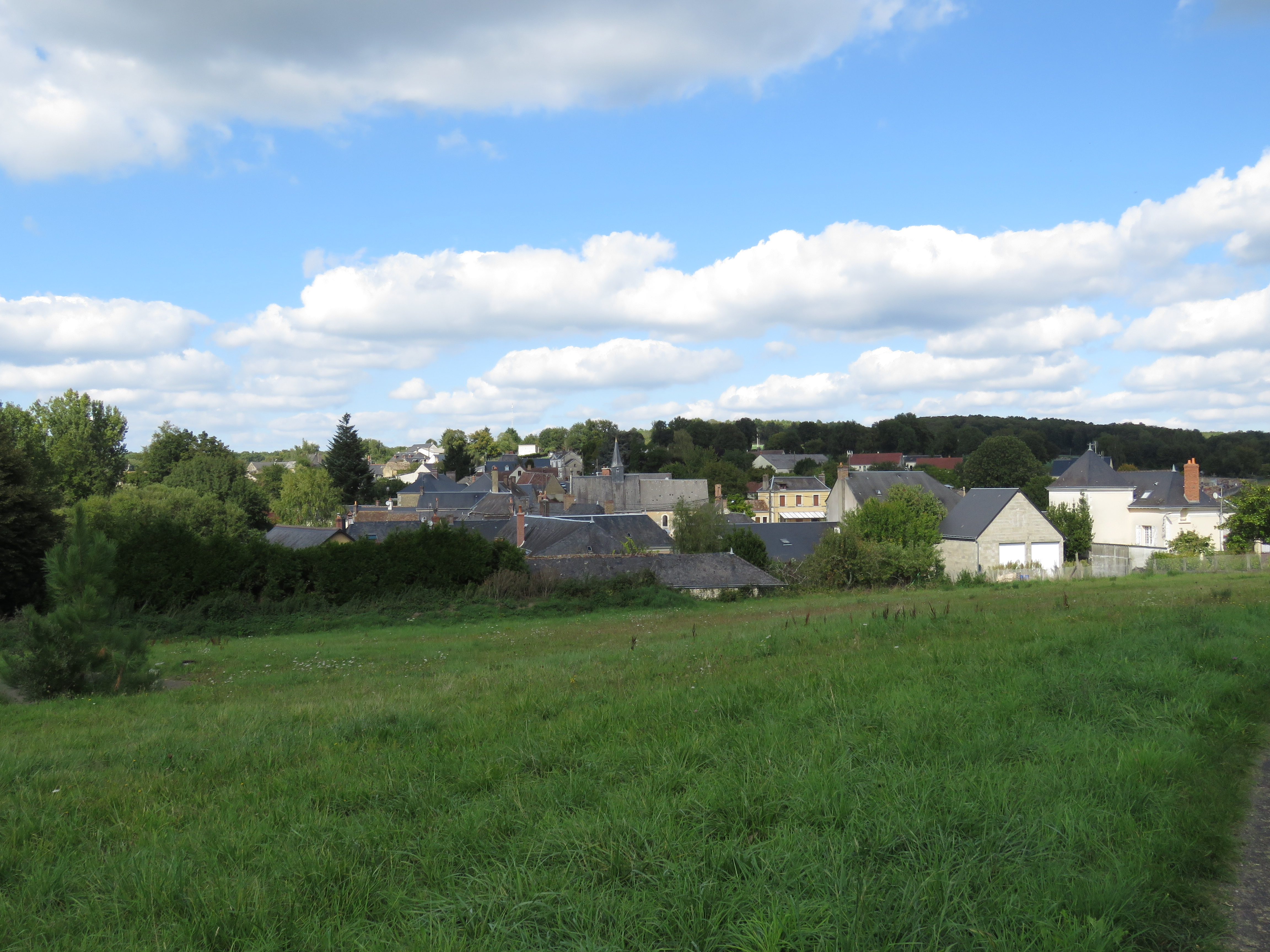 Lavernat depuis la route du Ponceau